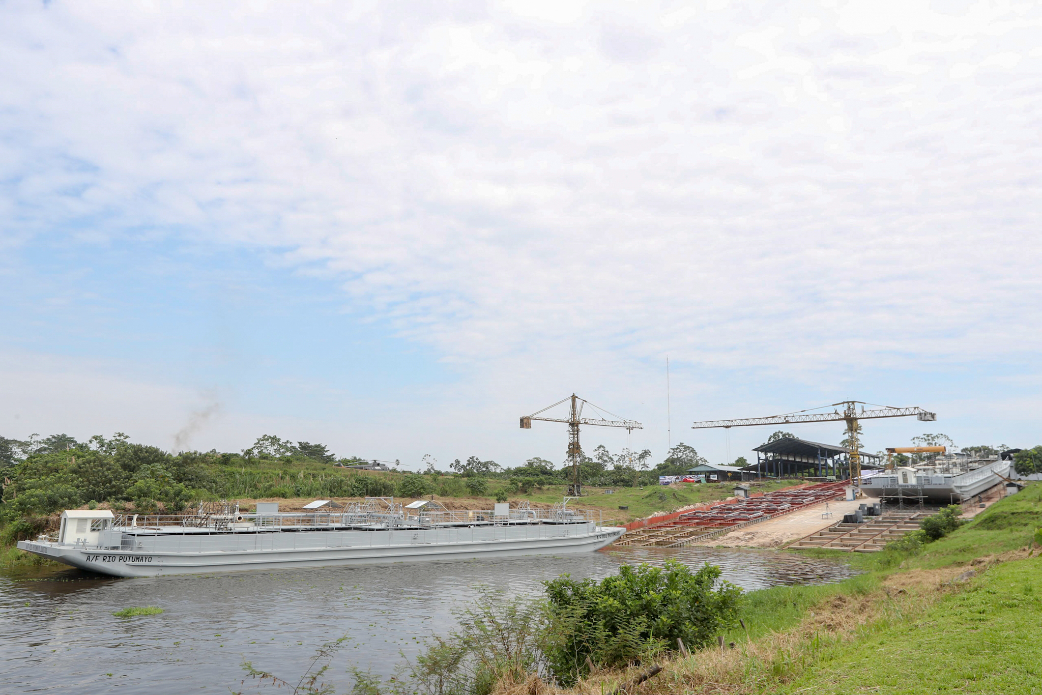 Botadura de nave en el SIMA IQUITOS